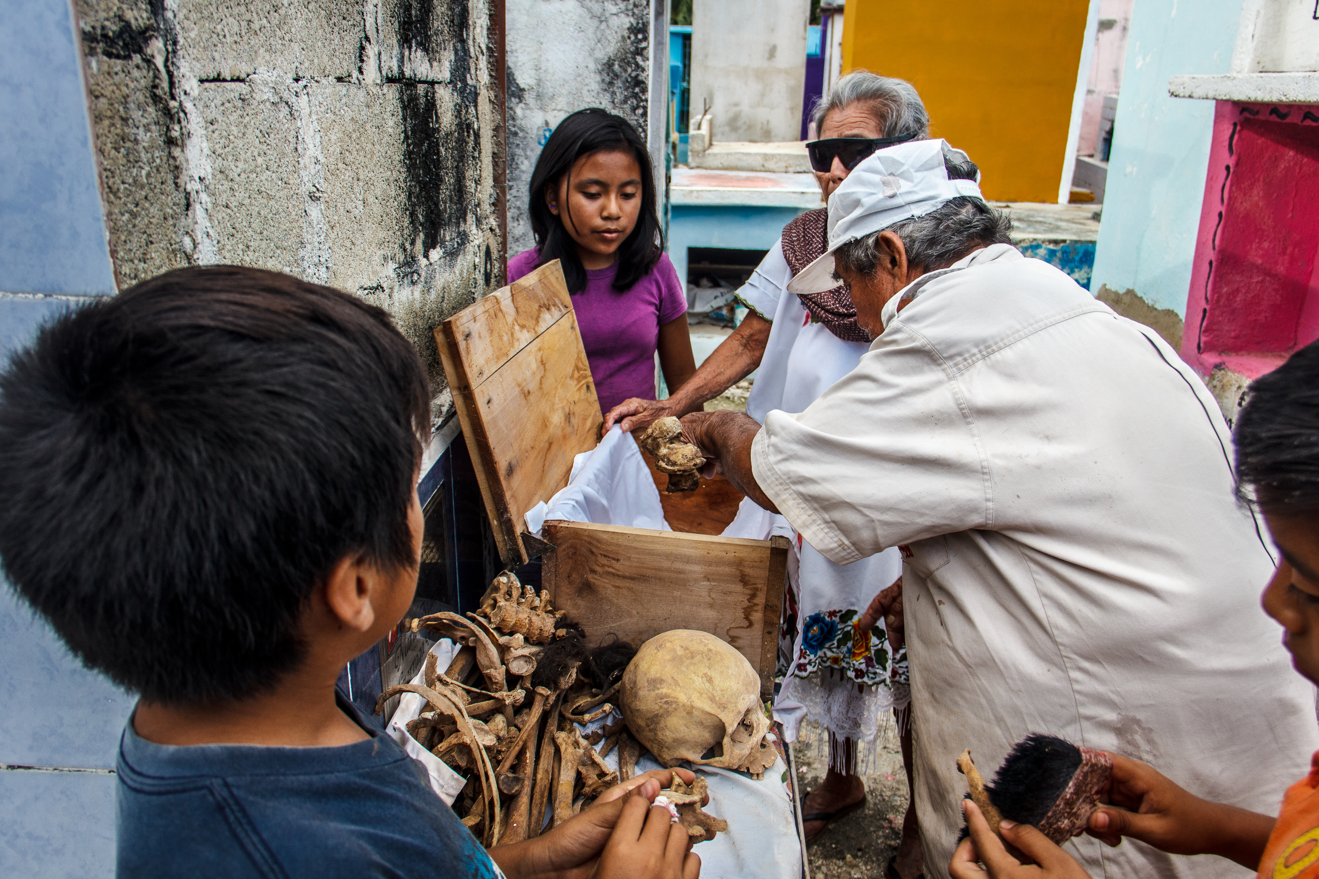 En México tenemos la tradición de recibir una vez al año a las almas de nuestros parientes ya fallecidos. El estado de Campeche tiene su propia adaptación particular de esta celebración incluyendo empezar desde una semana antes del 2 de noviembre (día de los muertos) la limpieza de los huesos de sus parientes: Tíos, abuelos, papas e incluso hijos, esto ocurre durante los días 20´s del mes de octubre y finaliza el día 2 de noviembre. La familia del difunto acude a con brochas, pintura y baldes de agua para limpiar la morada antes de la llegada del difunto y así poder recibirlo con su "ropa nueva" que es un mantel donde están los huesos envueltos después de haber estado previamente enterrados por 3 años y después exhumados para ser colocados en cajas de madera que sirven como contenedores y envueltos con su mantel que simboliza la ropa. ¡Es por eso que Pomuch vive por sus muertos! ¡y las nuevas y tradiciones también!.